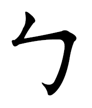 бо чжуинь